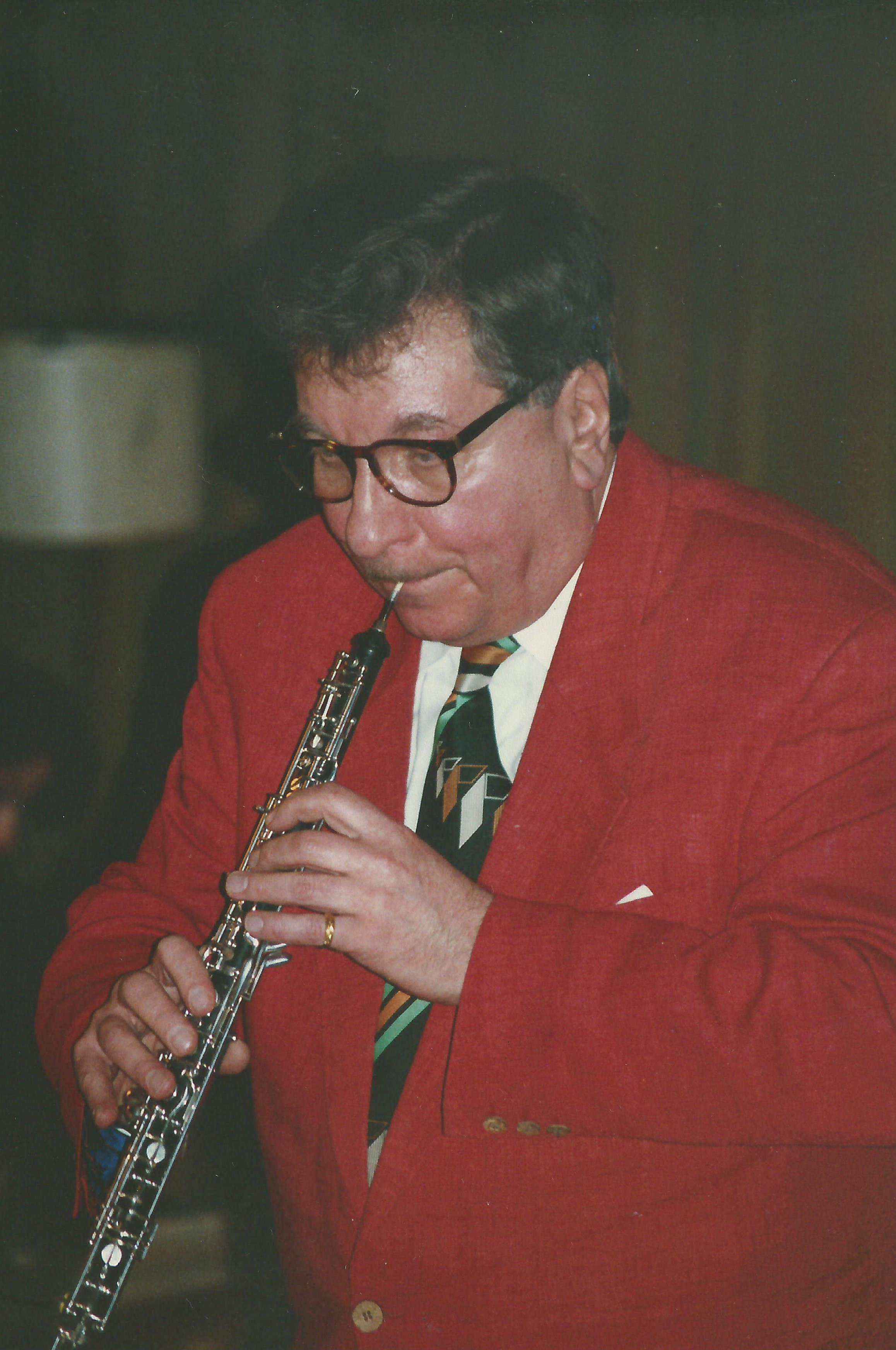 Prof. Alfred Hertel